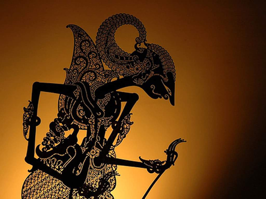 wayang